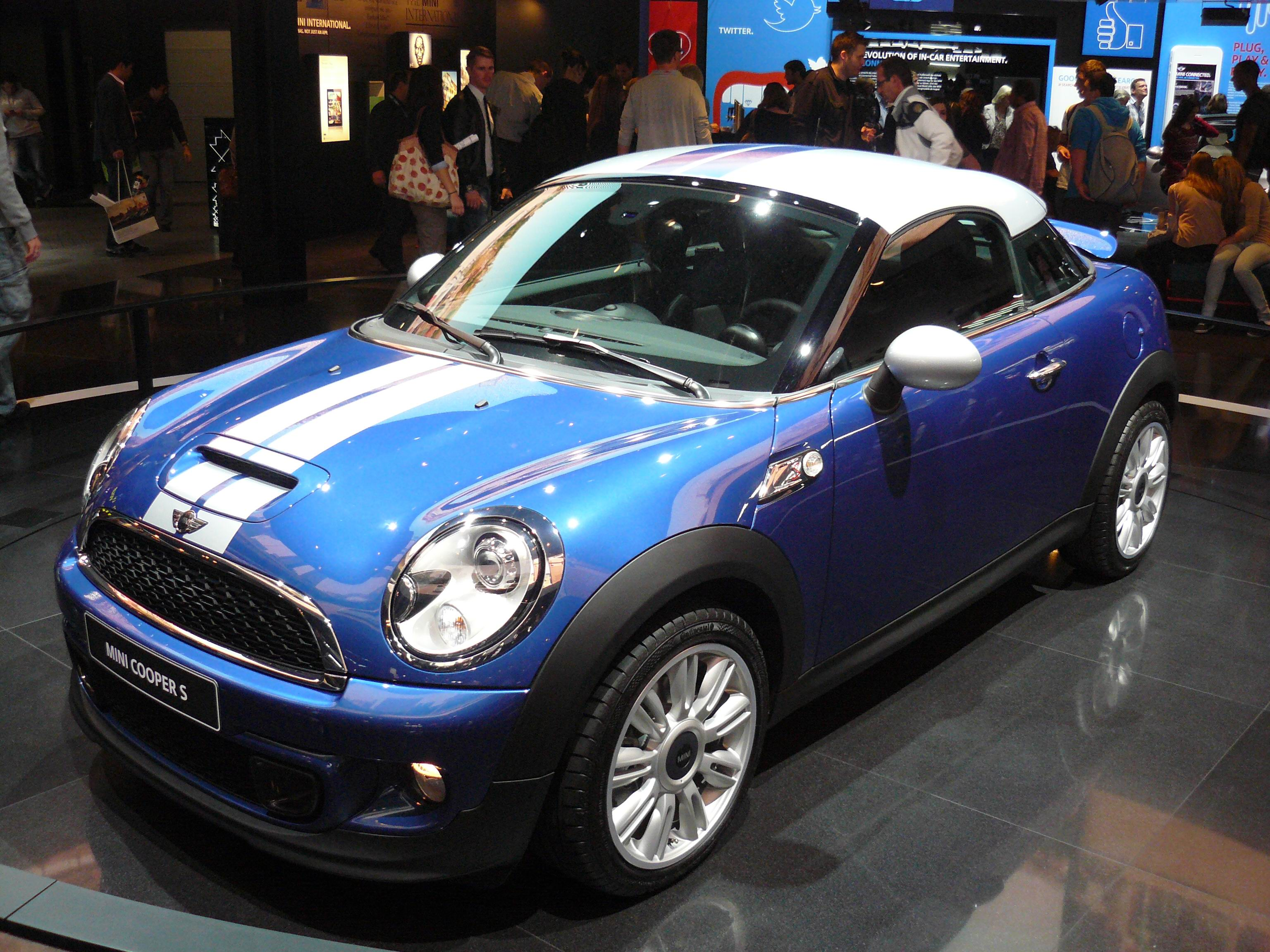 Français cadien: Salon de Francfort 2011